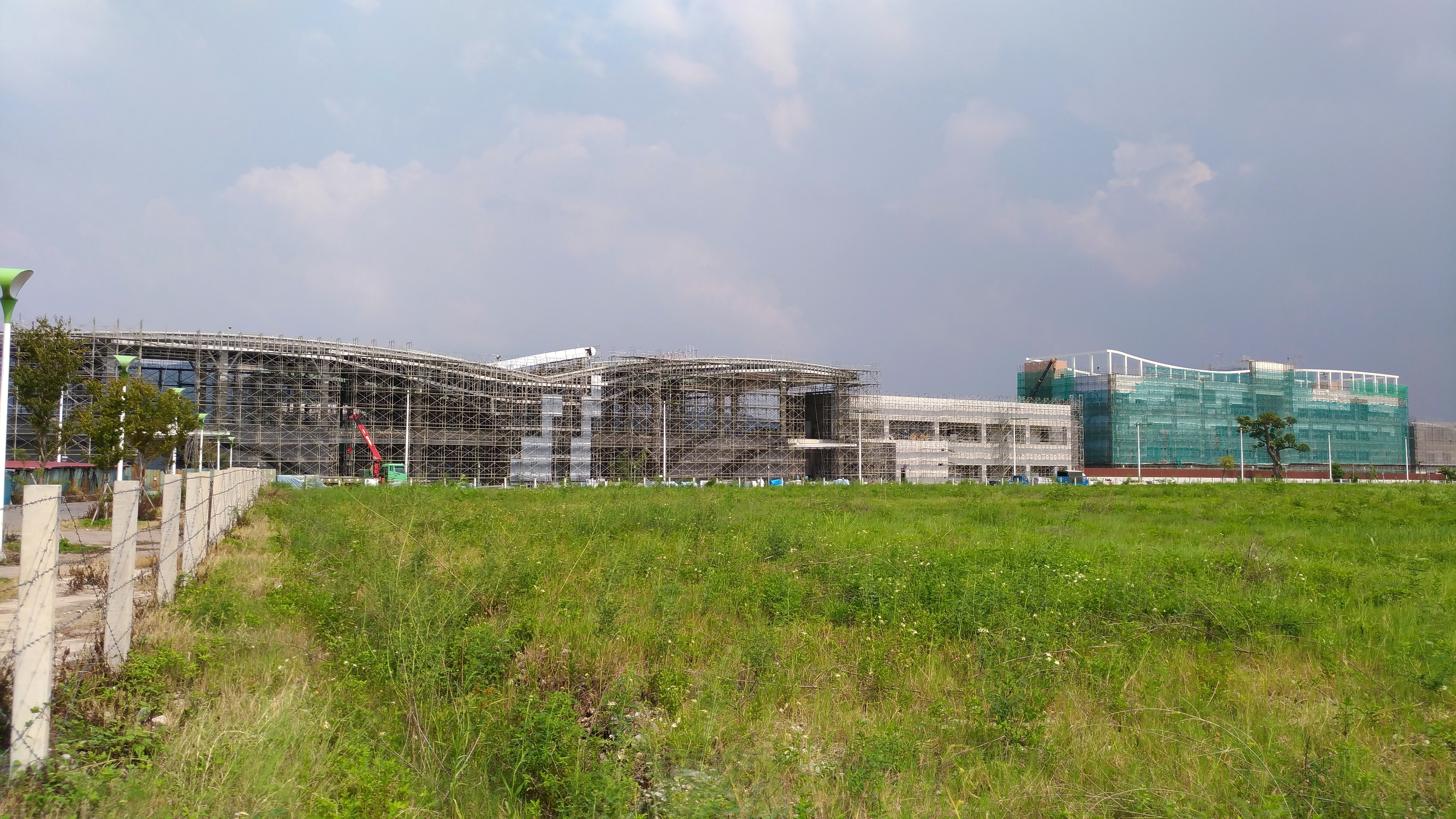 臺中捷運綠線G0車站與北屯機廠2017年9月工程